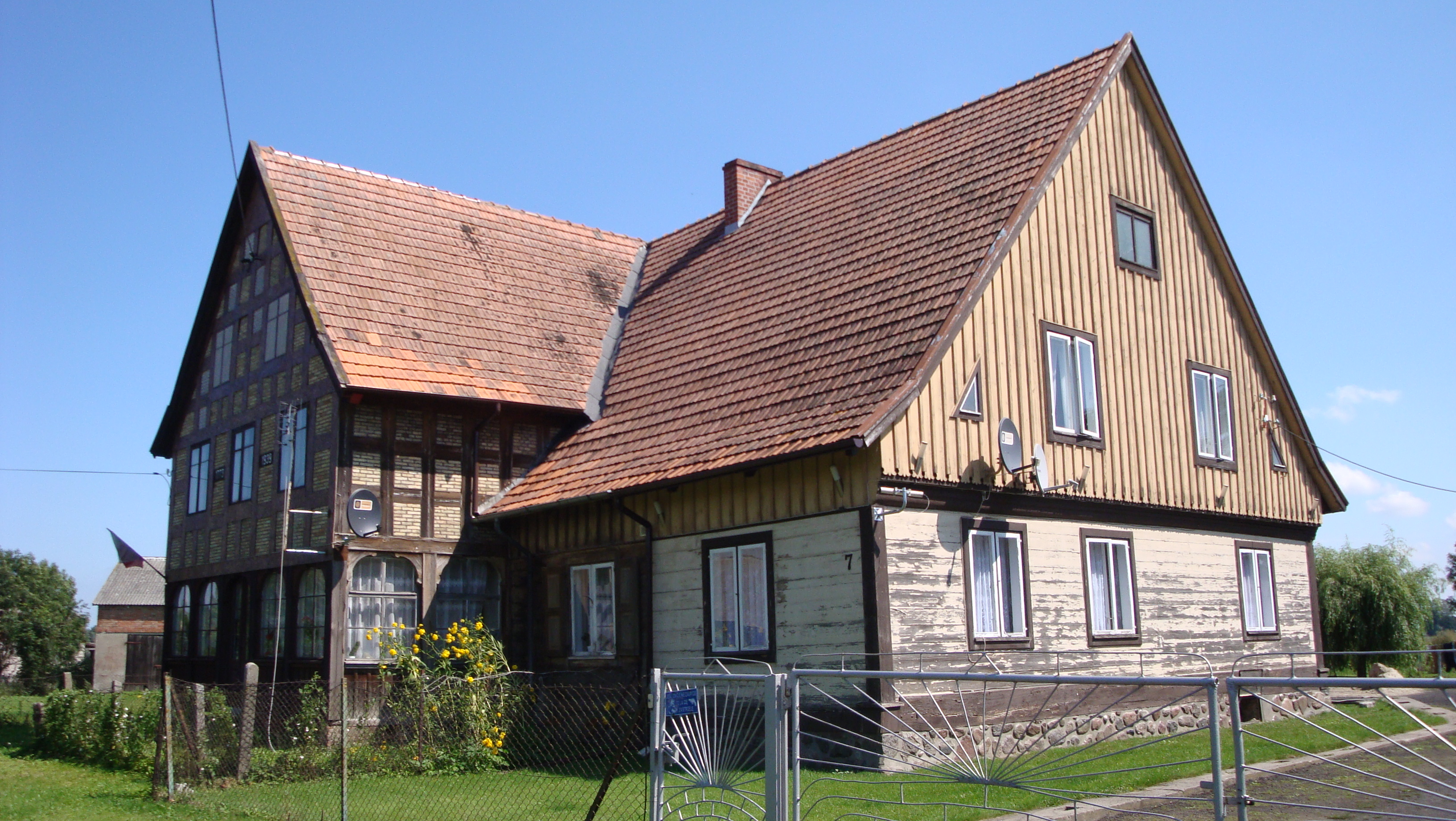 Marynowy 47/57 - dom podcieniowy z 1773 r., przebud. w 1939 (zabytek nr 121/N z 20.09.1961)